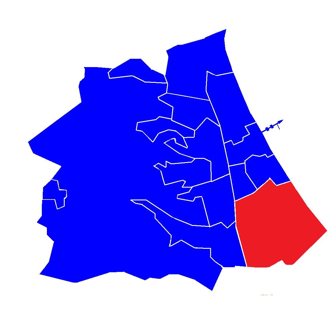 Karlikowo - district of Sopot